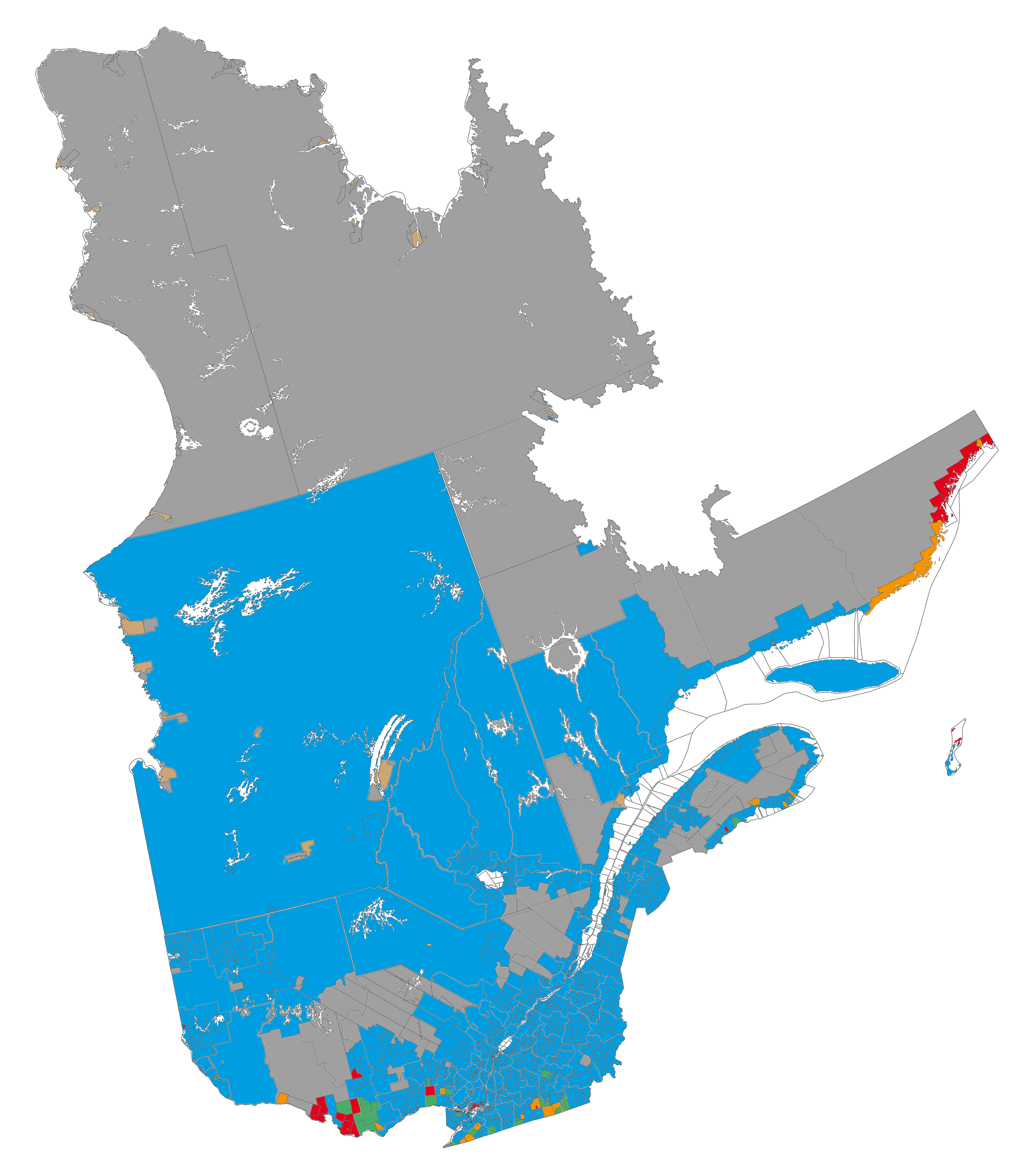 English (en): Linguistic map of the province of Quebec (source: Statistics Canada, 2006 census) francophone majority, less than 33% anglophone francophone majority, more than 33% anglophone anglophone majority, less than 33% francophone anglophone majority, more than 33% francophone allophone majority (indigenous) data not available français (fr): Carte linguistique de la province du Québec (source de données: Statistique Canada, recensement de 2006) majorité francophone, moins de 33 % d'anglophones majorité francophone, plus de 33 % d'anglophones majorité anglophone, moins de 33 % de francophones majorité anglophone, plus de 33 % de francophones majorité allophone (autochtones) données non disponibles